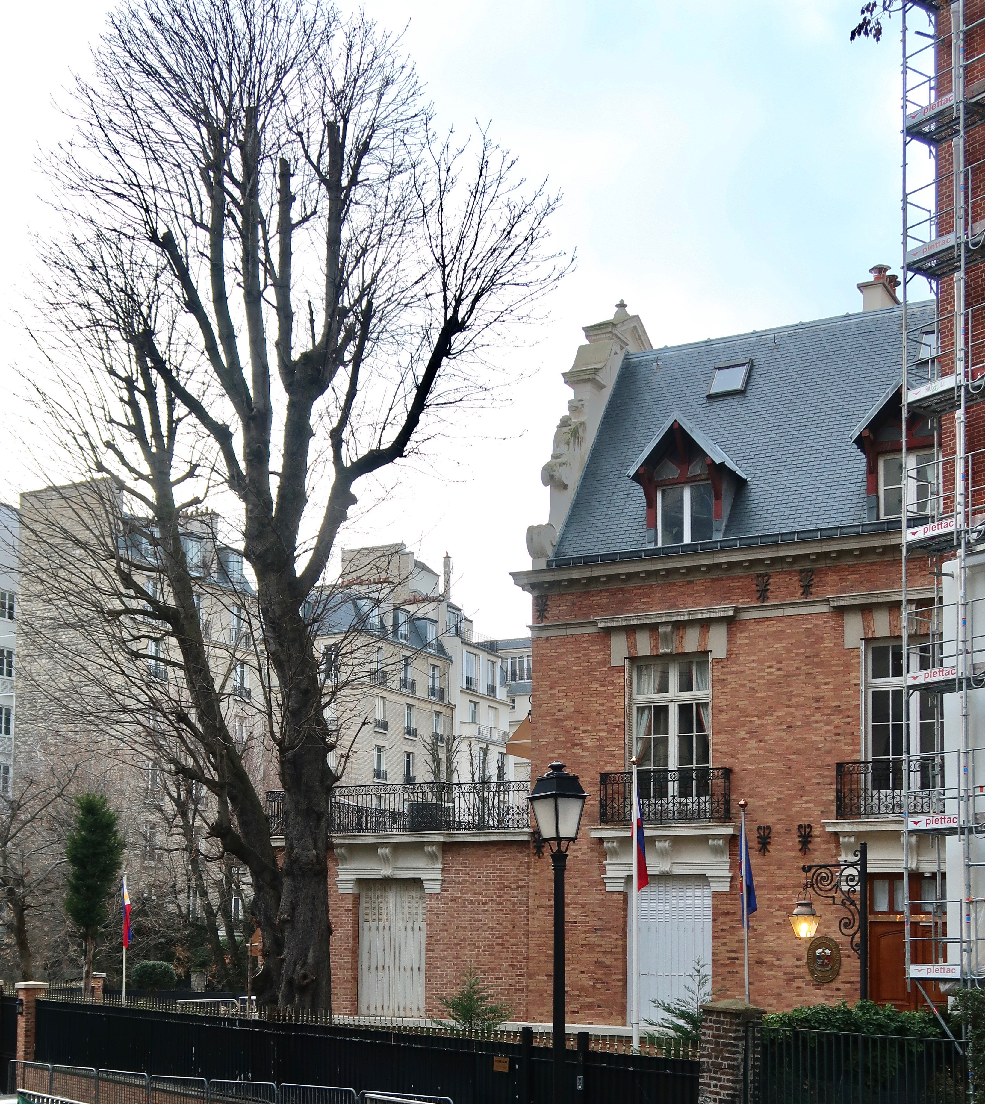 Ambassade des Philippines en France, n°4 hameau de Boulainvilliers, accès n°45 rue de Ranelagh (Paris, 16e).